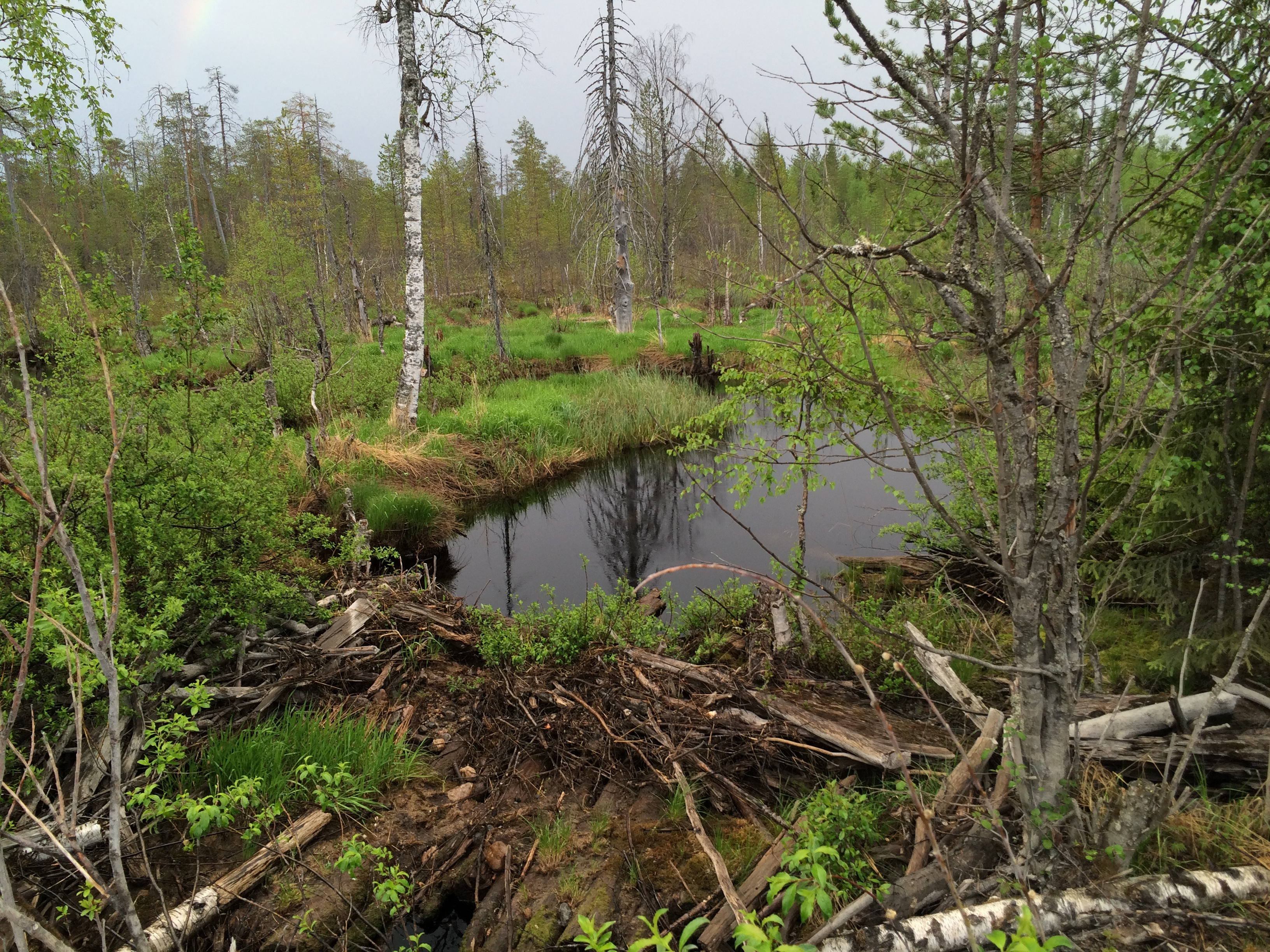 Вара (приток Терманта)